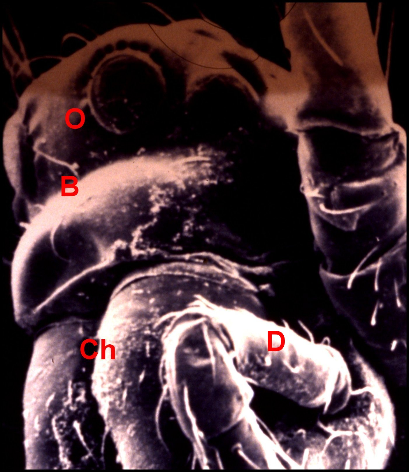 Femelle paratype d' Argyrodes benedicti, prosome, vue au microscope électronique à balayage.